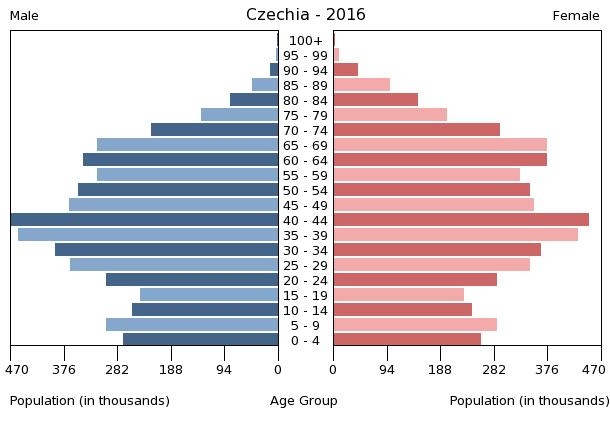 A population pyramid illustrates the age and sex structure of a country's population and may provide insights about political and social stability, as well as economic development. The population is distributed along the horizontal axis, with males shown on the left and females on the right. The male and female populations are broken down into 5-year age groups represented as horizontal bars along the vertical axis, with the youngest age groups at the bottom and the oldest at the top. The shape of the population pyramid gradually evolves over time based on fertility, mortality, and international migration trends.